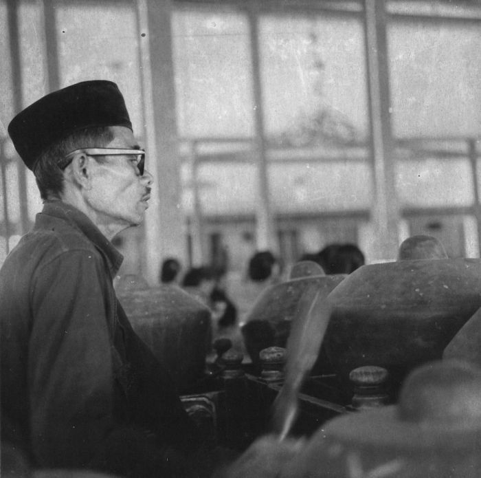 Negatief. Man die de kenong bespeelt in een gamelanorkest